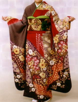 costume traditionnel Hurisode, avec l'aimable autorisation de mon amie, merci a elle.